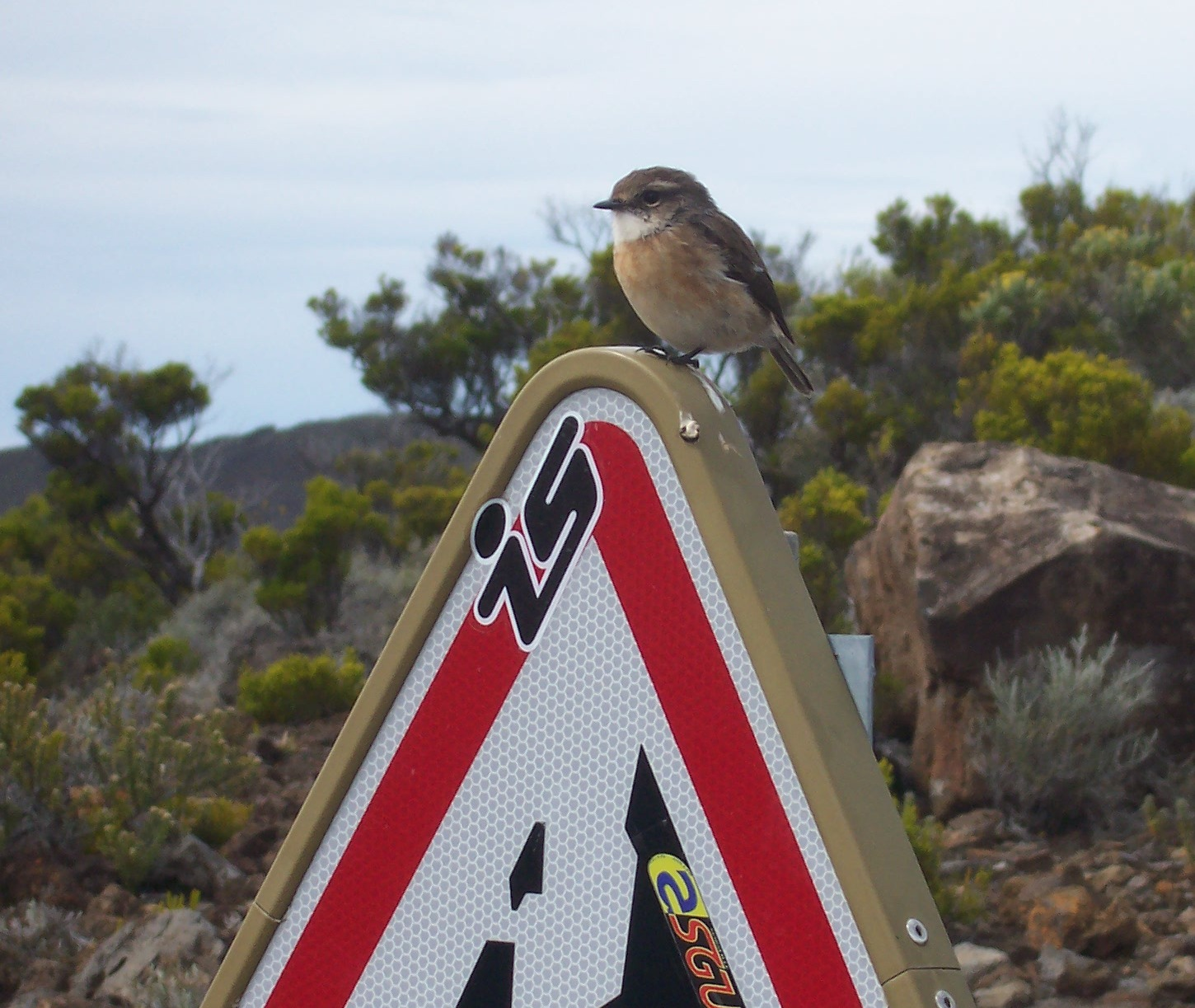 Saxicola tectes fr : tec-tec ou tarier de la Réunion Photo: B.navez - 15 APR 2006 - Réunion island